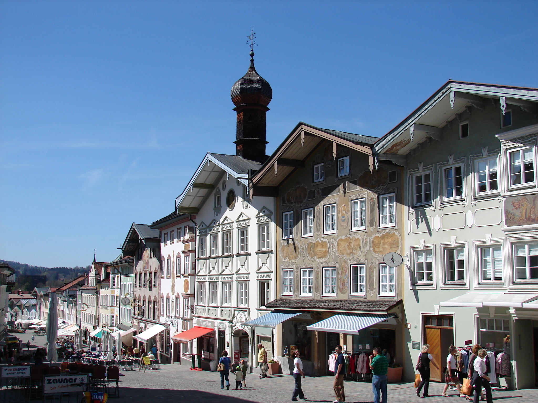 Die Marktstraße bildet ein spätmittelalterliches und barockes Ensemble mit breitgelagerten und mit Fassadenmalereien (Lüftlmalerei) geschmückten Häusern der Tölzer Kaufleutefamilien und Patrizier.